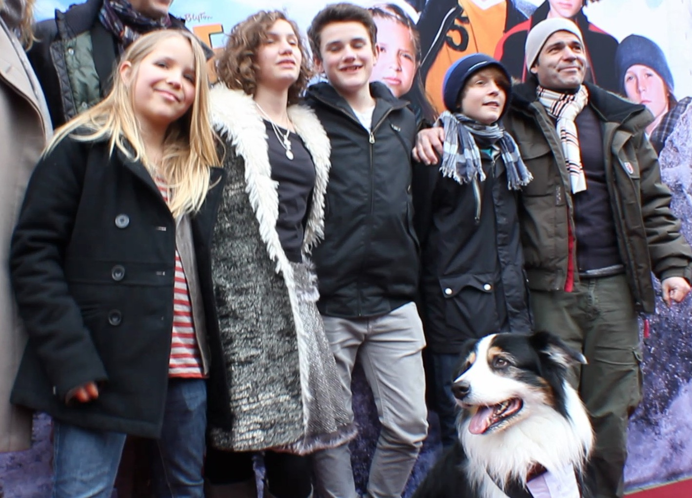 Die Fünf-Freunde-Darsteller und der Regisseur des Kinofilms Fünf Freunde (2012) bei der Schleswigpremiere des Films